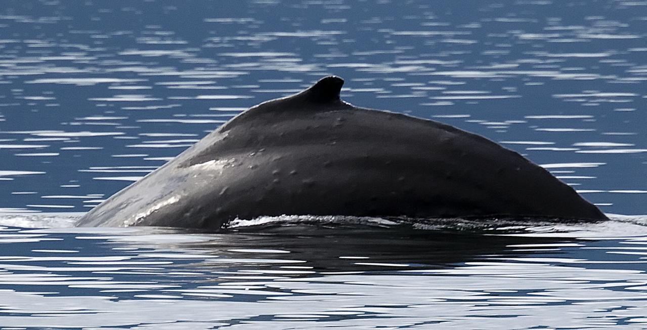 glacier bay